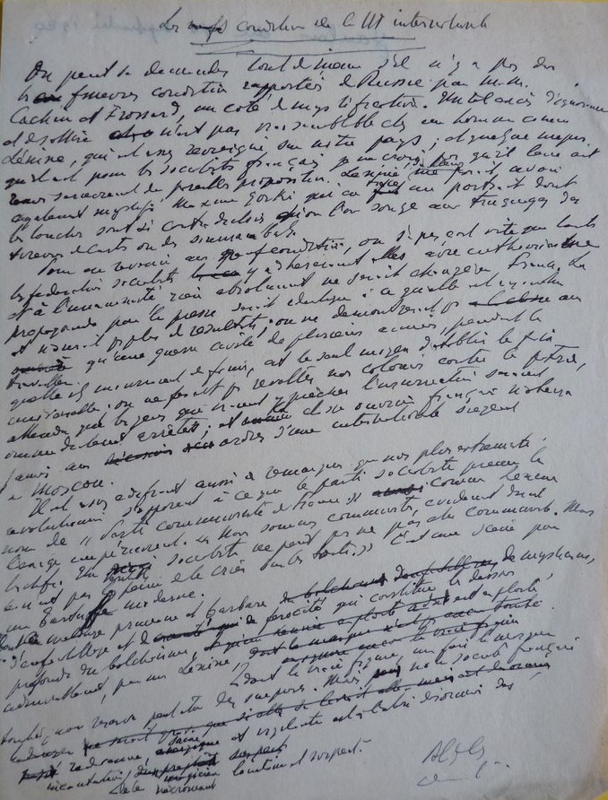 Рукопись статьи Албфреда Капю «Требования интернационала», вышедшая в газете Le Gaulois под заголовком «Условия Ленина».